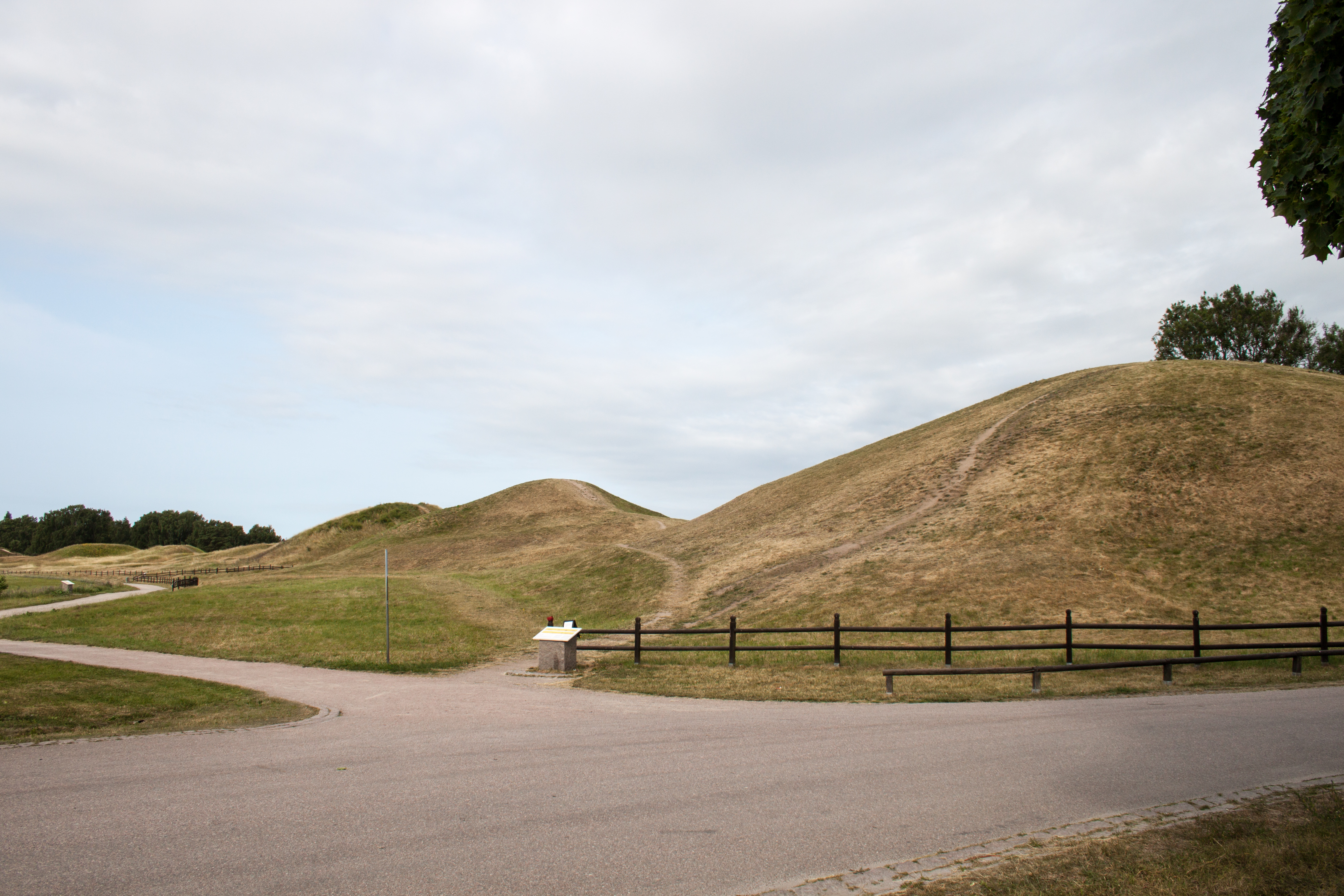 Royal mounds in Gamla Uppsala